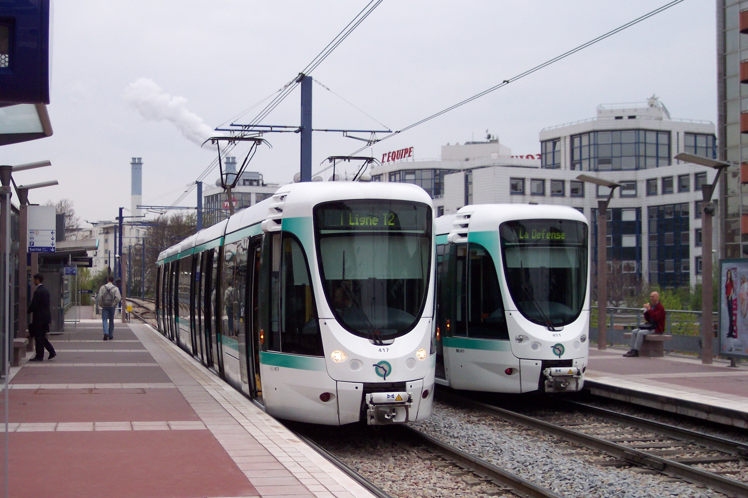 Straßenbahn in Paris Linie T2 (Gare d'Issy - Val de Seine). Aufnahme vom 12.04.2005 Paris, Frankreich Source = Schachi